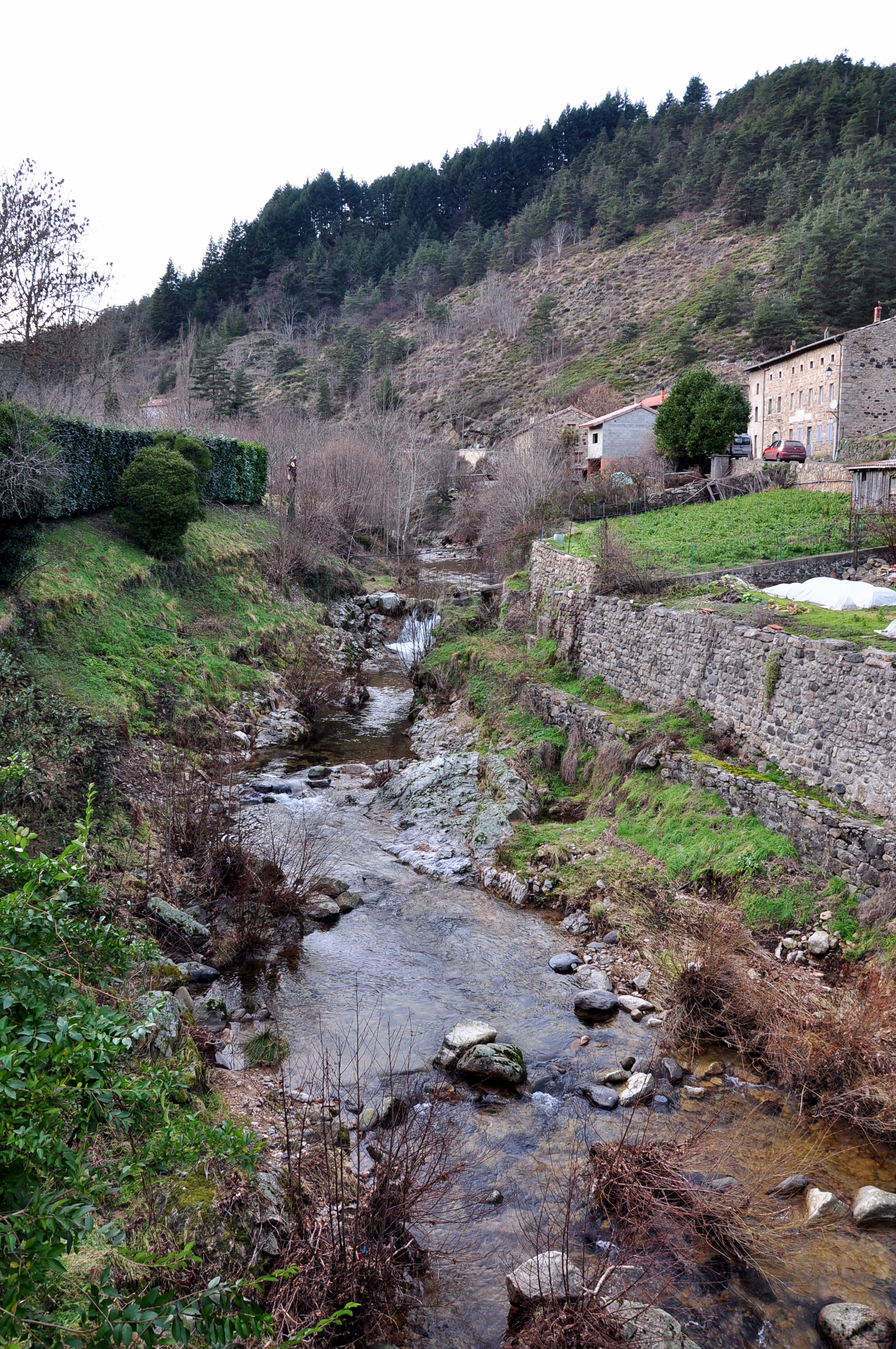 Le Talaron depuis le pont de Saint-Christol.